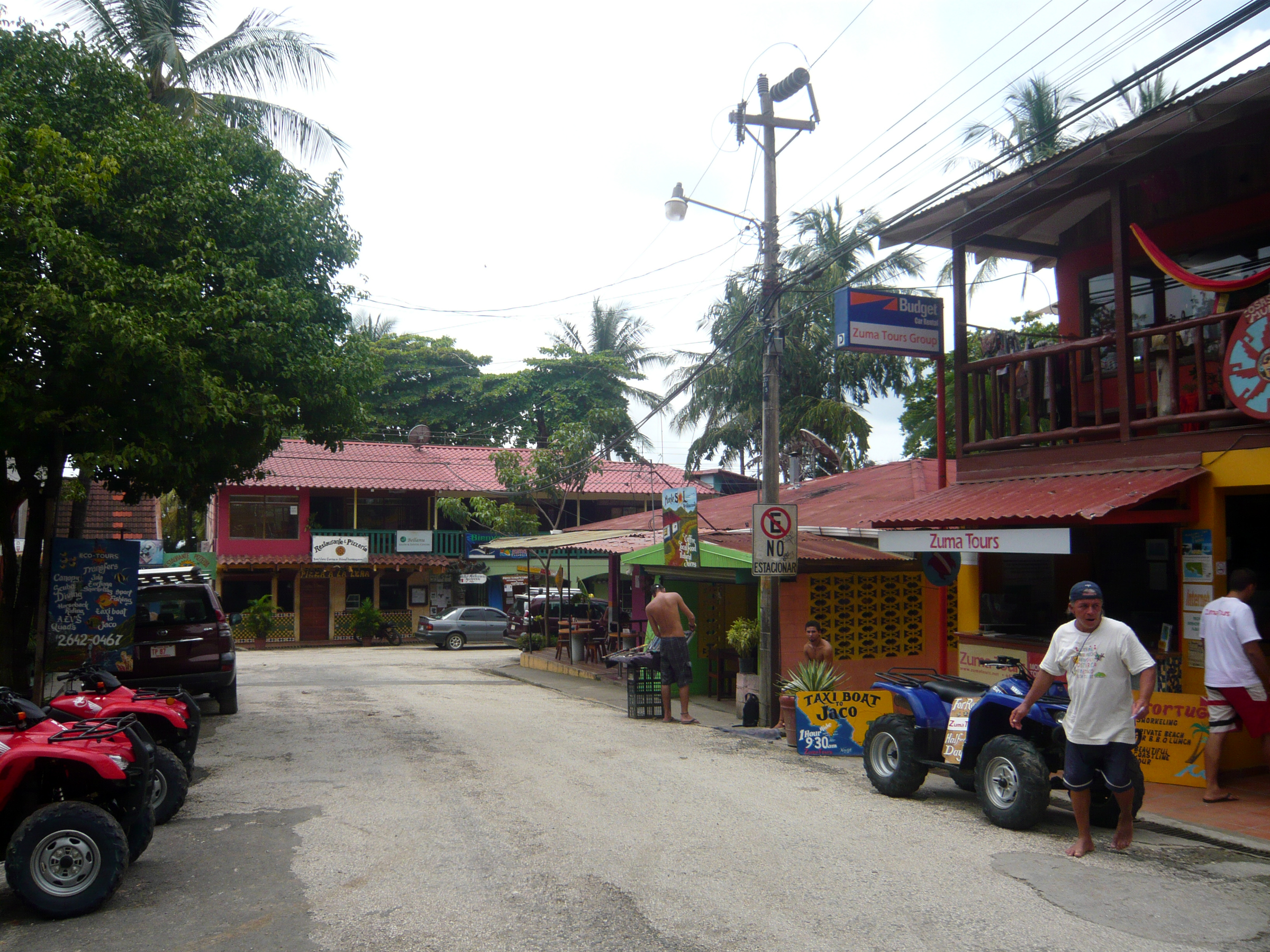 Montezuma i Costa Rica